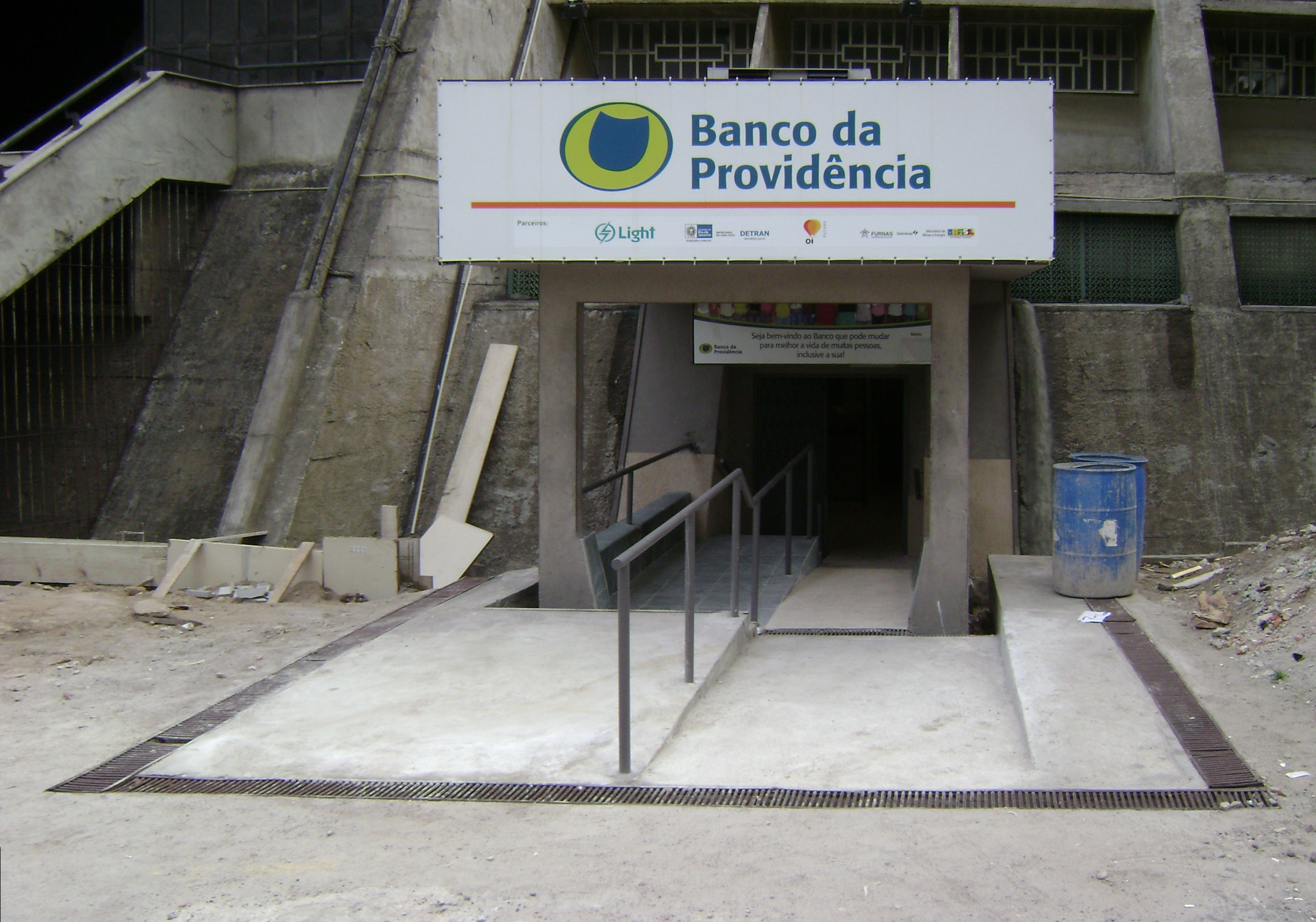 Entrada de filial do Banco da Providência ao lado da Catedral Metropolitana do Rio de Janeiro.